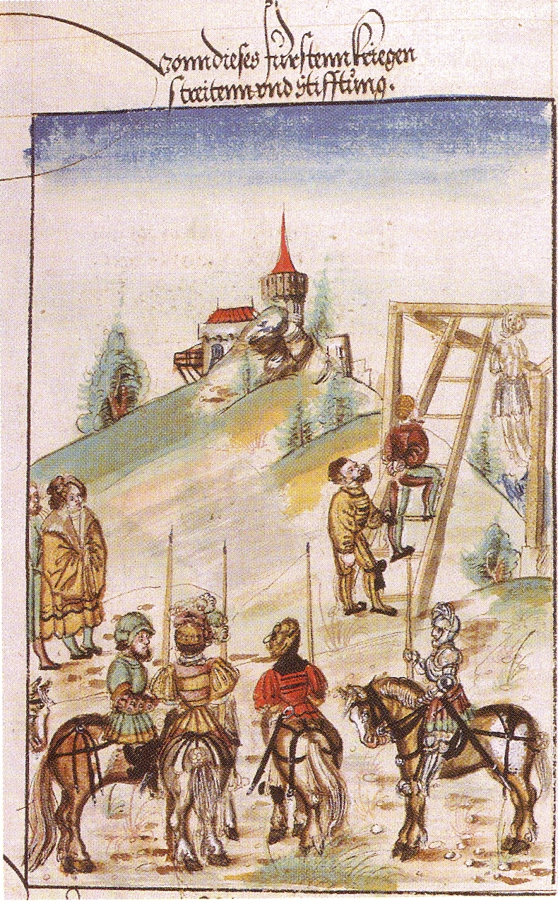 Heinrich der Löwe läßt den Obodritenfürsten Wertislaw erhängen.